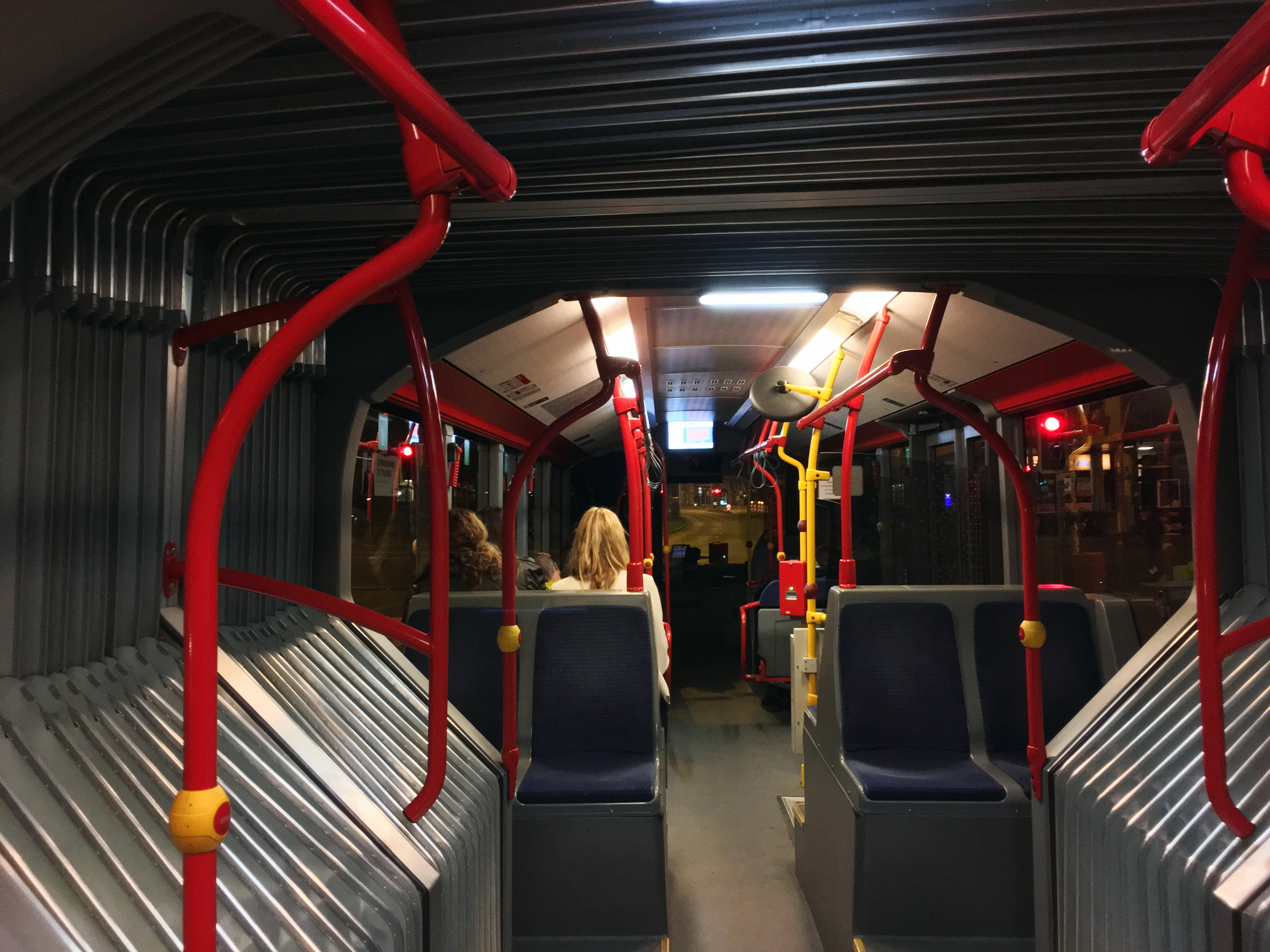 Innenanschicht eines Nightliners am Nürnberger Plärrer